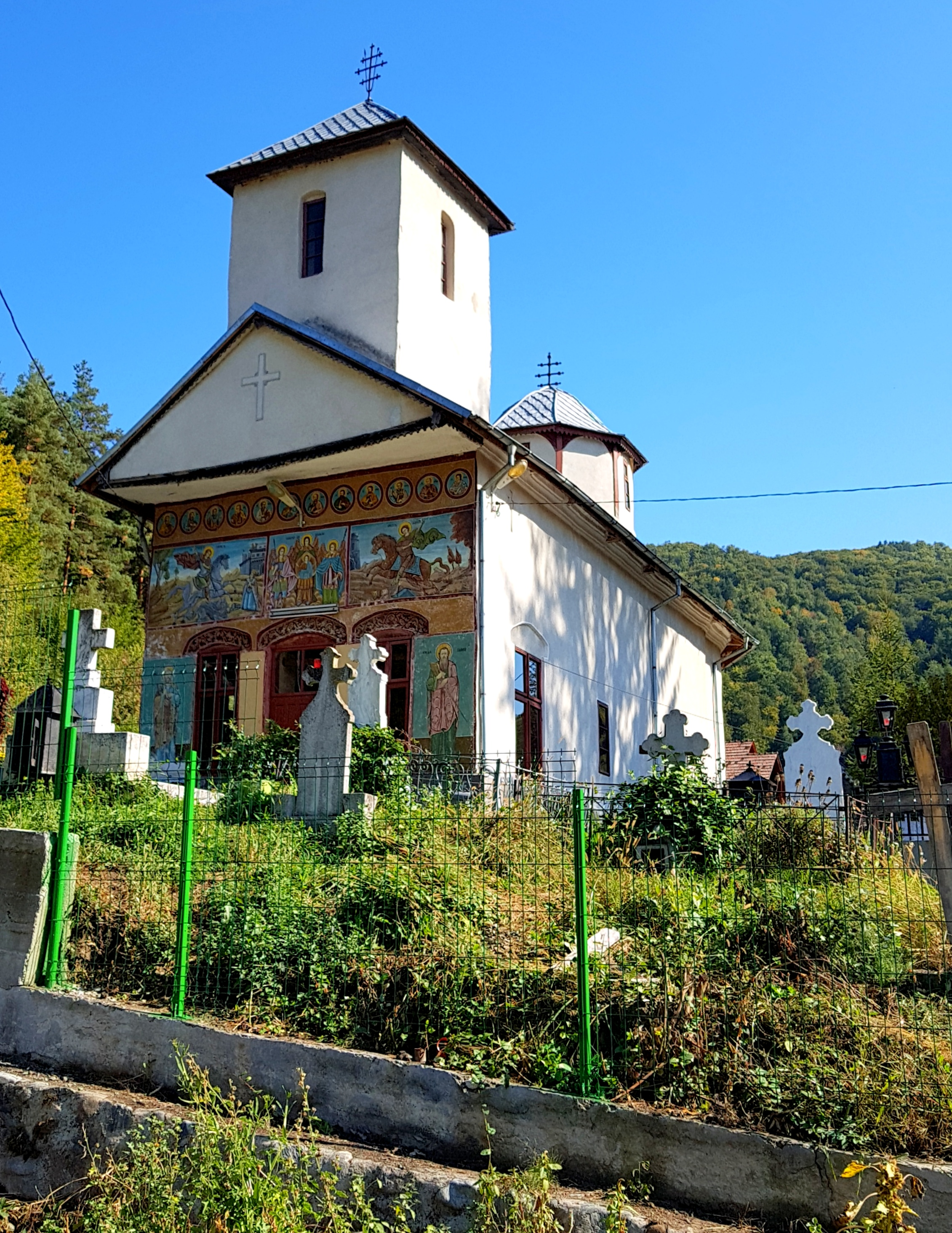 Biserica „Sf. Voievozi”